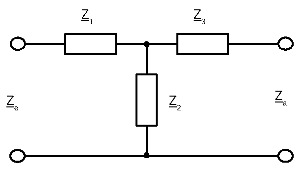 Zeichnung stellt ein passives Widerstandsnetzwerk (4-Pol) zur Impedanzanpassung dar